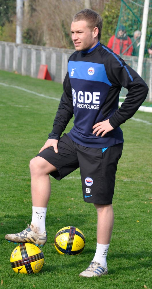 Thibault Moulin à l'entrainement